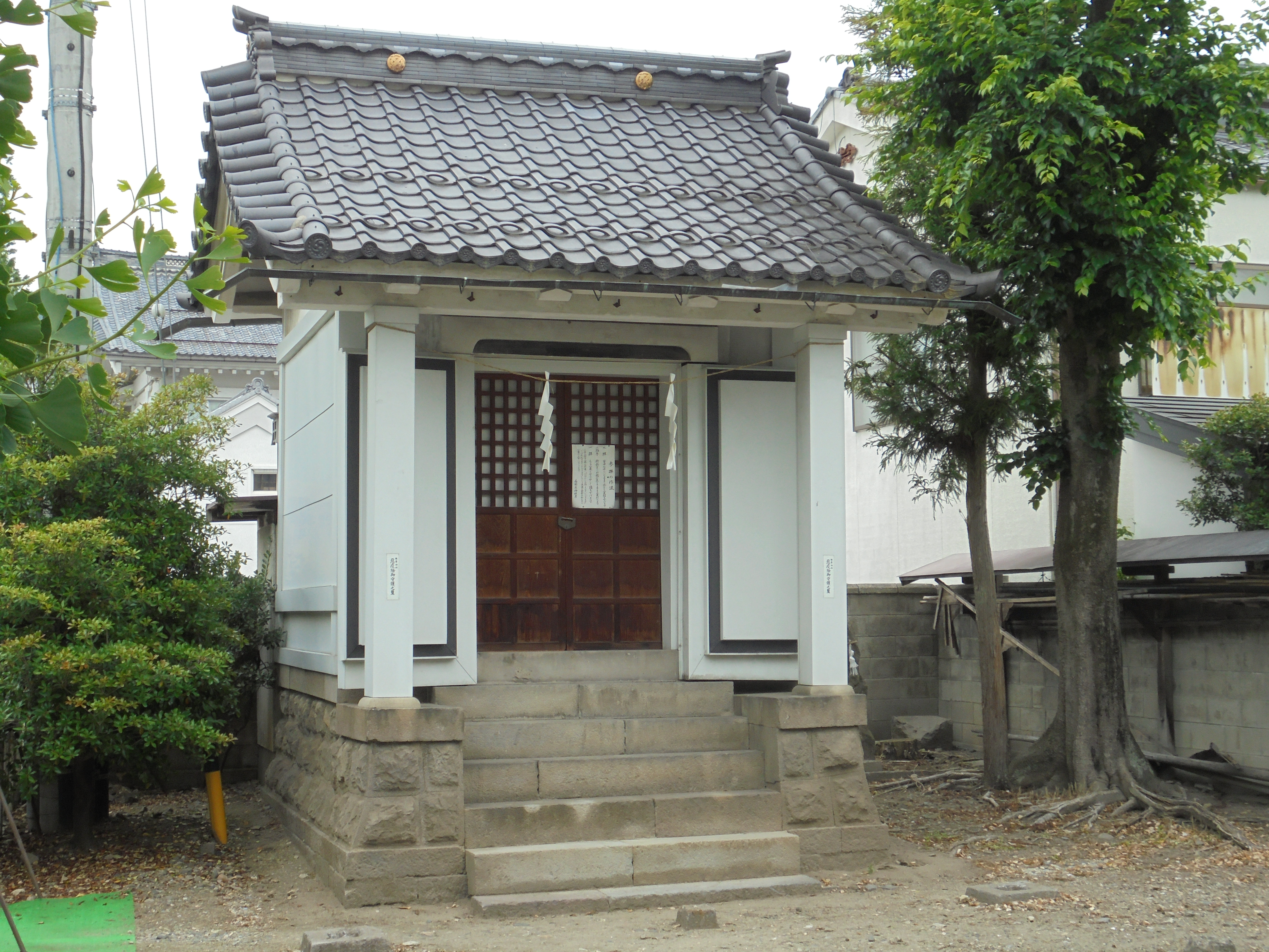 弥栄神社本殿覆屋（長野県長野市上西之門町）